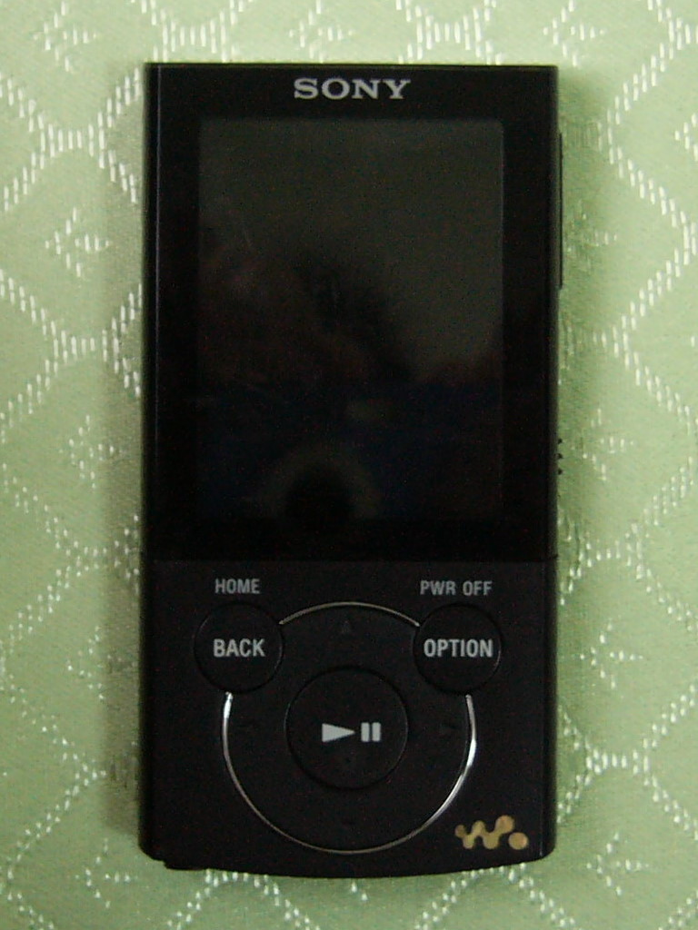 Sony Walkman NWZ-E443F正面